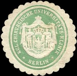 Siegel der Königlichen Chirurgischen Universitätsklinik zu Berlin